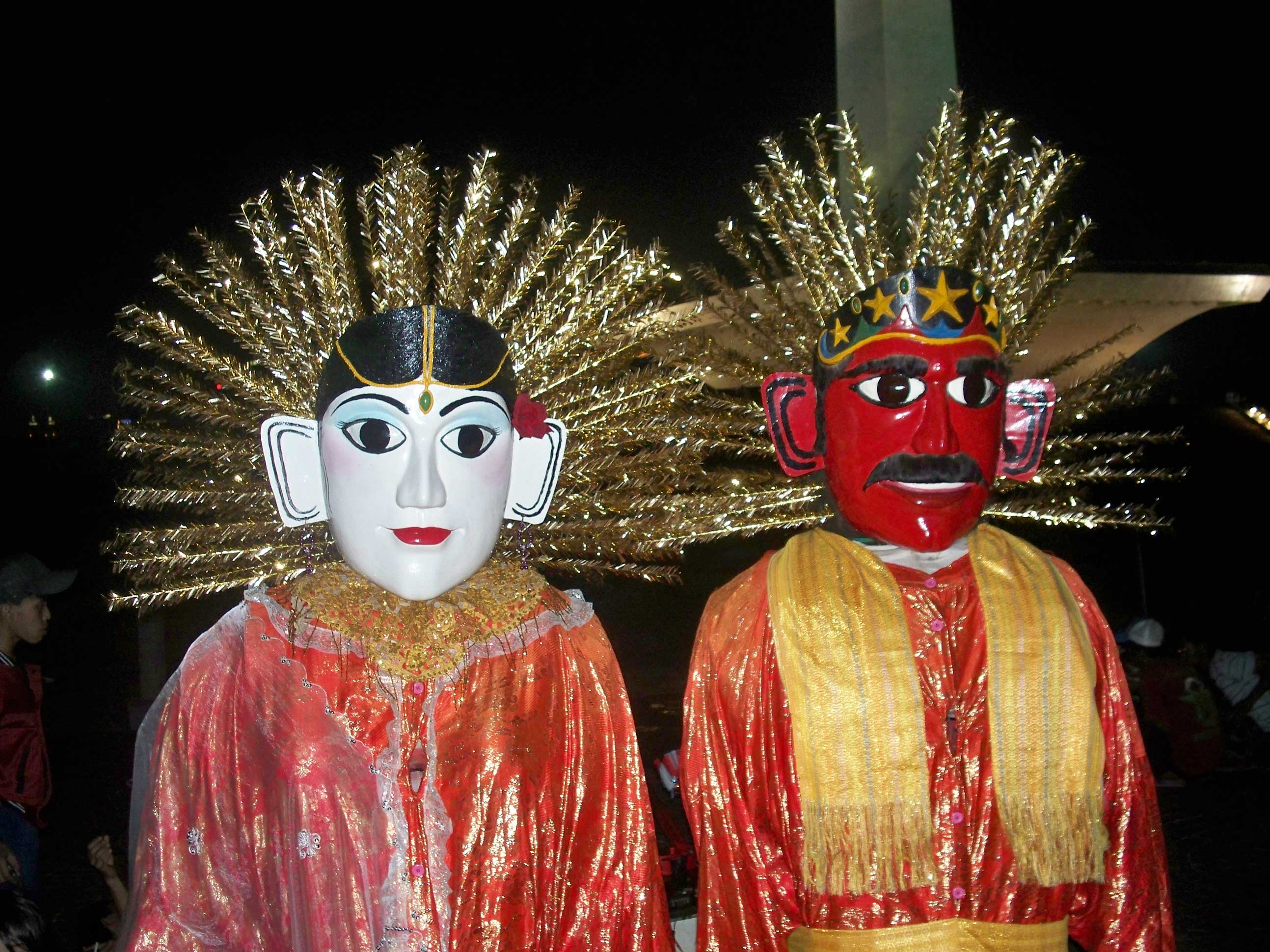 Ondel Ondel Khas Betawi